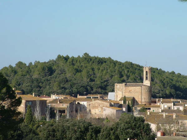 Parlavà (Catalunya).